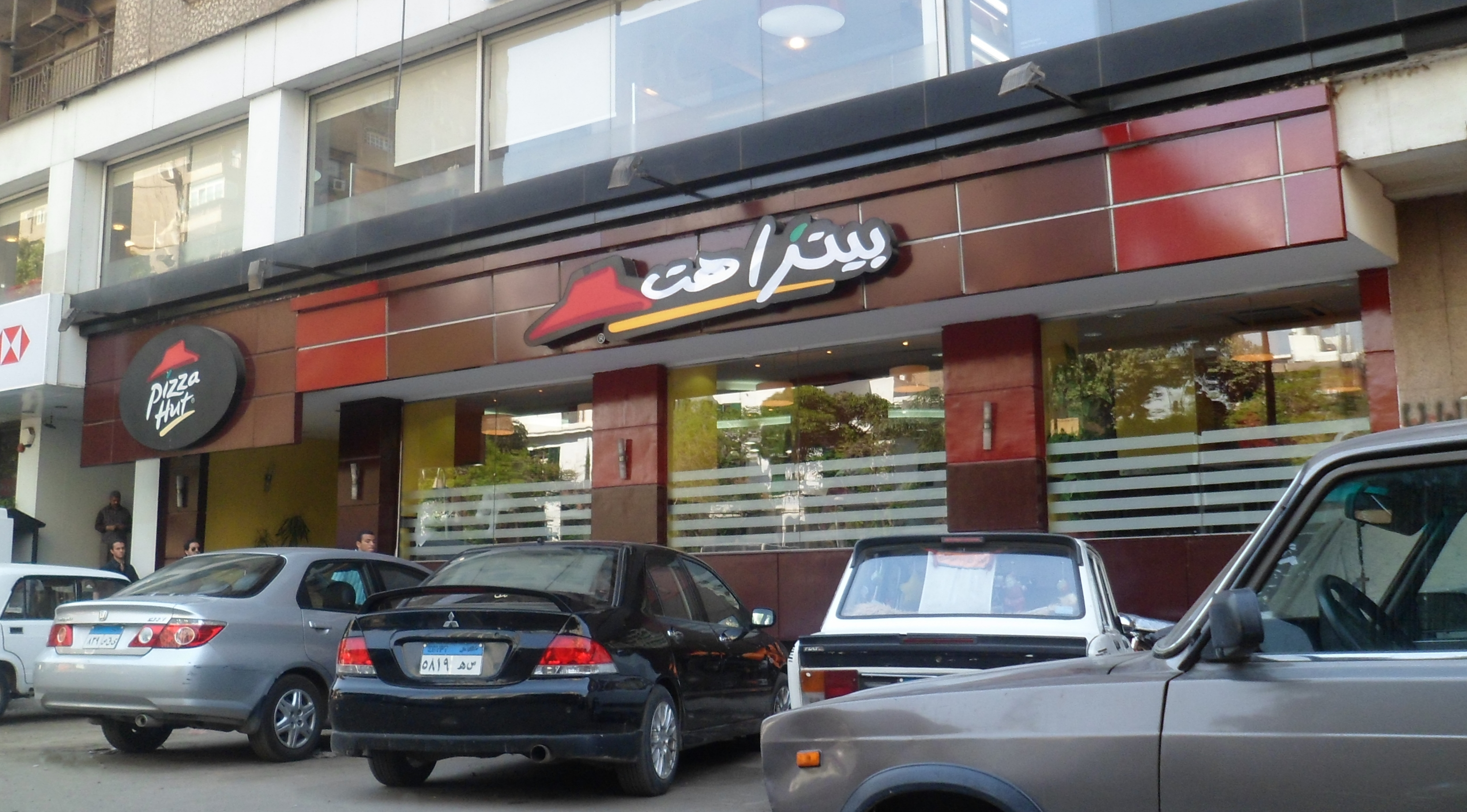 مطعم بيتزا هت بميدان الوحدة الأفريقية (ميدان المساحة)، الدقي، مدينة الجيزة، مصر